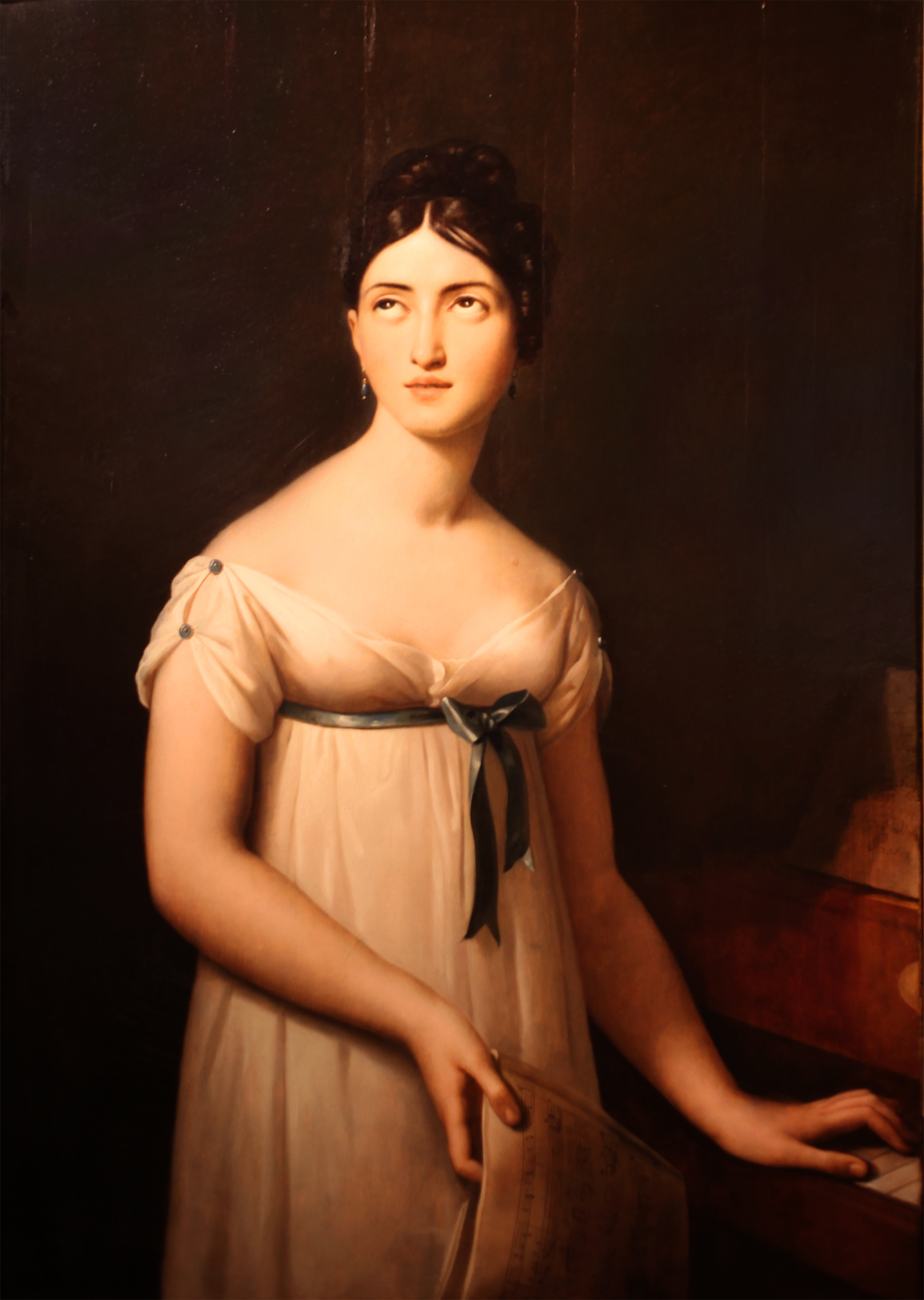 Giacomo Serangeli (1768-1852) Ritratto della cantante lirica Giuditta Pasta (1797-1865); deposito degli eredi Ferranti-Pasta; Museo del Teatro alla Scala, Milano. N.B. l'immagine è stata riportata alle corrette proporzioni attraverso l'utilizzo di software, quindi non garantisce la precisione nel rapporto fra base e altezza del dipinto né la mancanza di distorsioni. I colori sono invece fedele ripoduzione dell'originale, così come le condizioni generali della tela. L'immagine è caricata per puri motivi documentaristici.